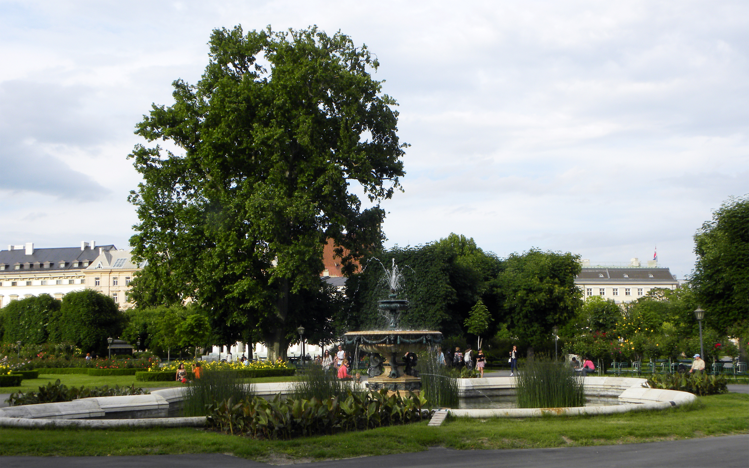 Volksgartenbrunnen